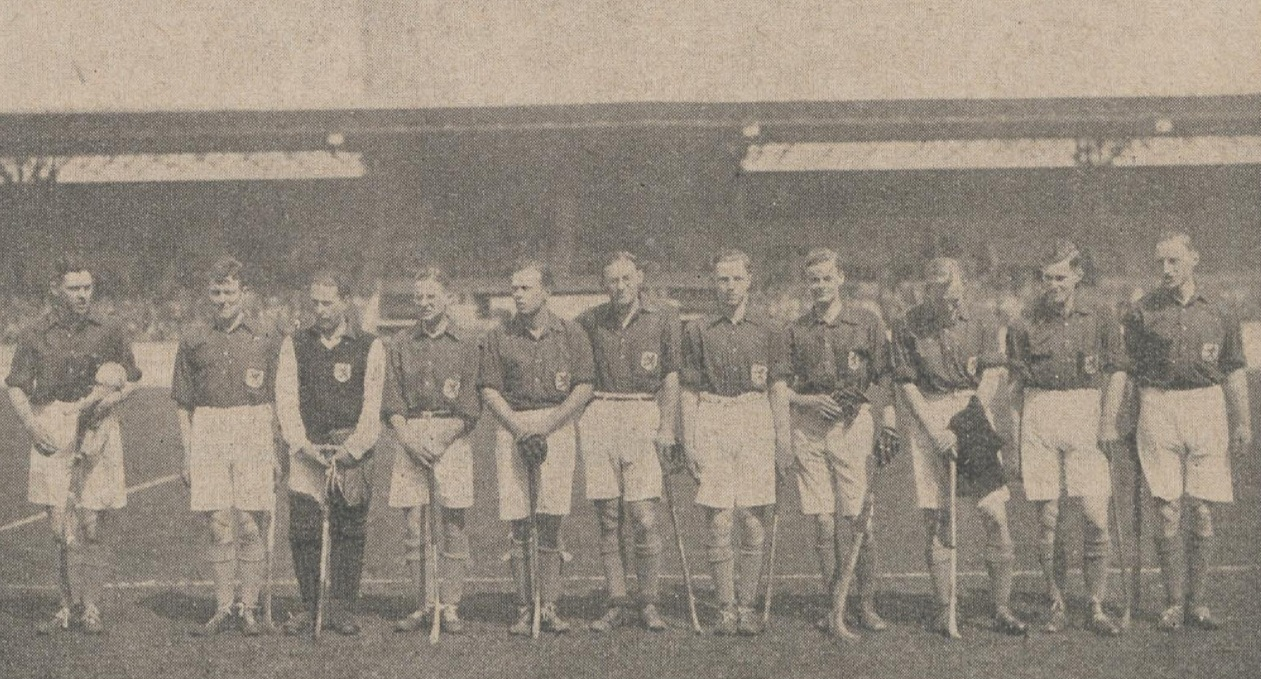 Het Nederlandsche hockey-elftal, hetwelk gisteren de Franschen met 5–0 geslagen heeft. Van links naar rechts: De Waal (aanvoerder), Visser ’t Hooft, Katte, v. d. Roevaert, Ankerman, v. d. Veen, Tresling, Jannink, Duson, Brand en Kop.